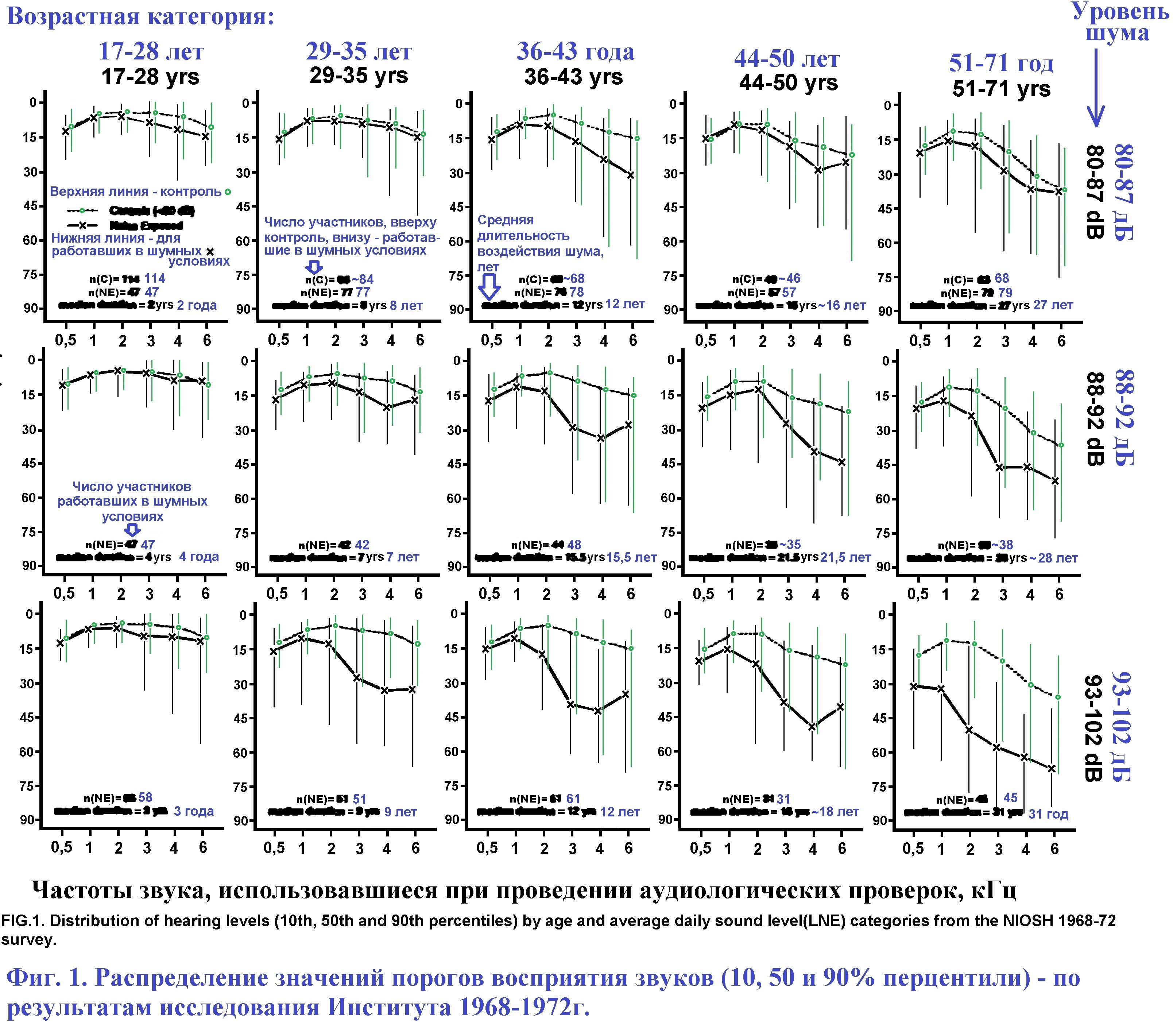 графики из приложения 1 к документу NIOSH, описывающему требования к работодателю по защите рабочих от шума. На графиках показано ухудшение слуха у людей, подвергавшихся воздействию чрезмерного шума, и у людей, работавших в малошумной обстановке. Приводятся данные для разного возраста, длительности воздействия шума, и разного уровня шума. Из-за низкого качества исходного изображения оно откорректировано вручную.